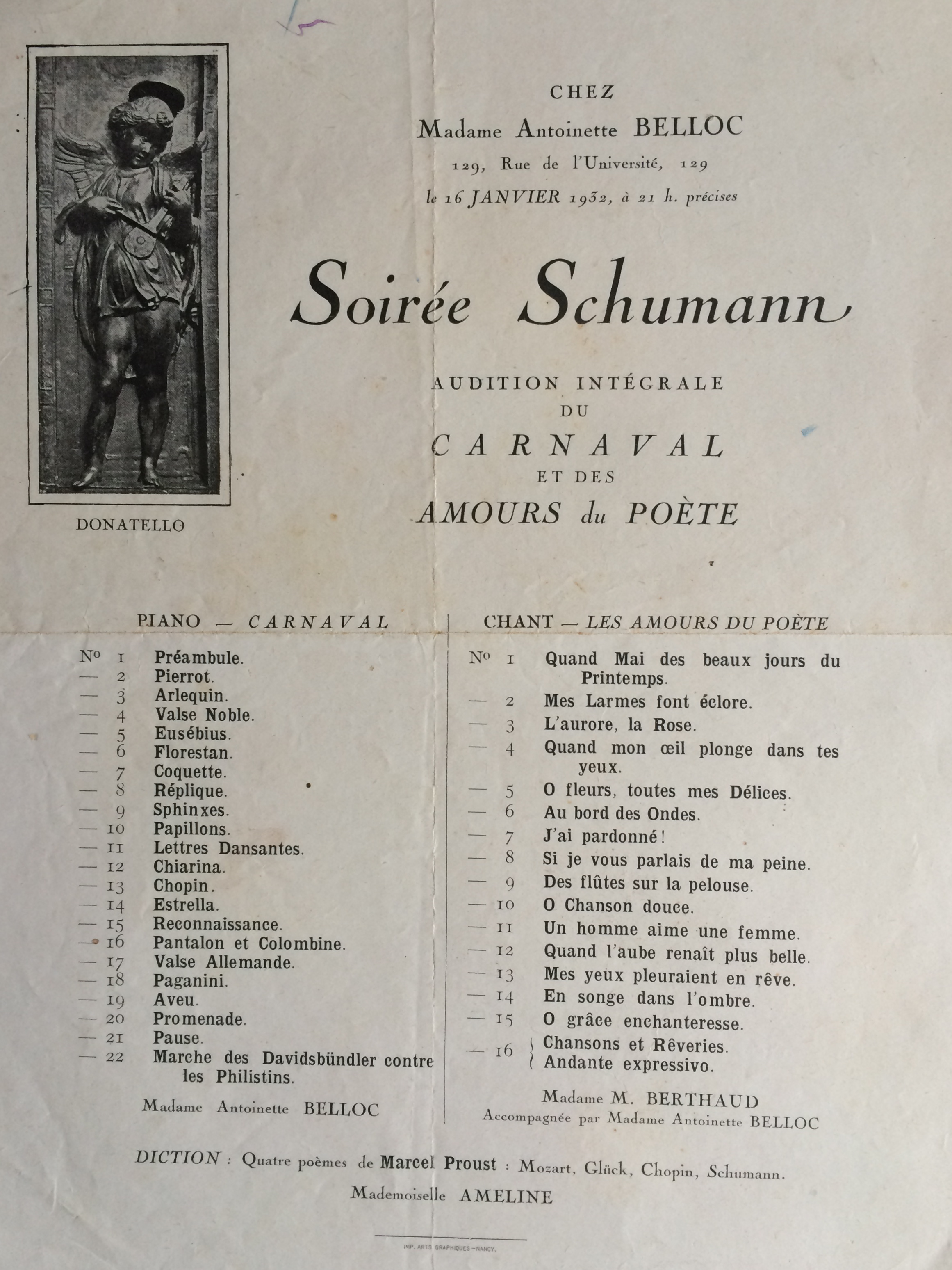 Programme du Soirée Schumann le 16 janvier 1932 à Paris chez la compositrice Marie-Antoinette Belloc